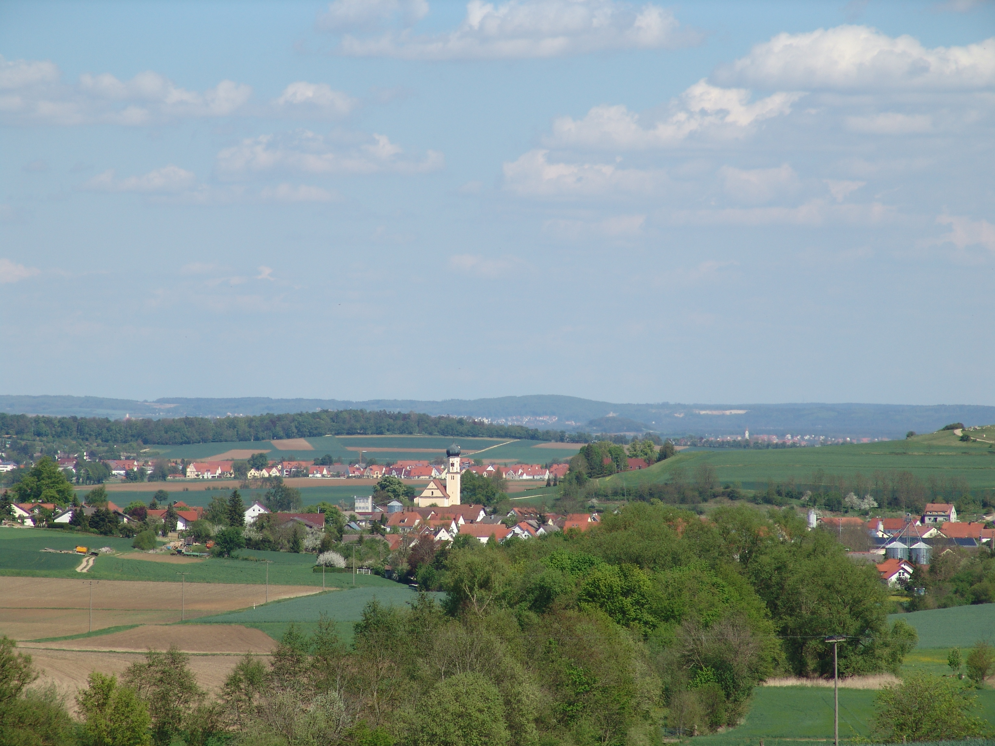 Blick auf Utzmemmingen